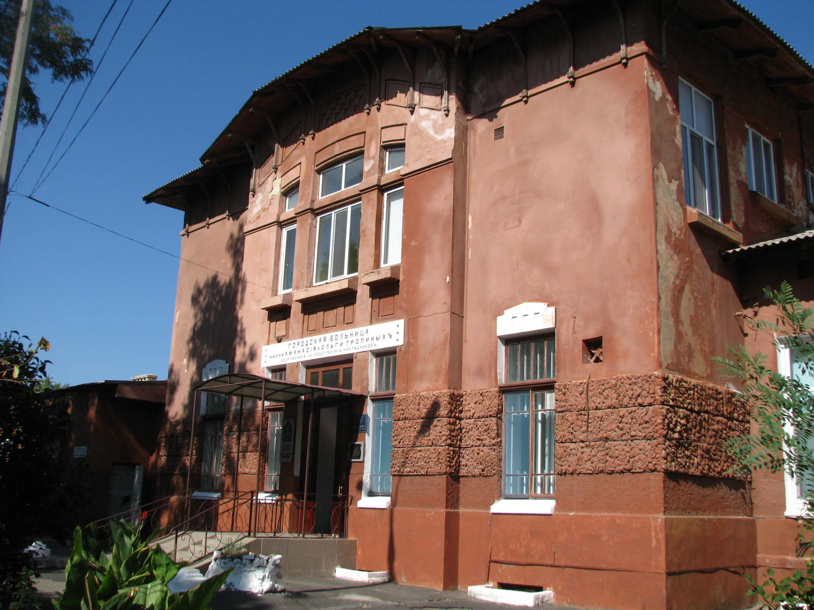 Лікарня ім. Тропіних (прим. укл.: вірогідно складається з одного двоповерхового та декількох одноповерхових корпусів), Херсон, Комарова вул., 2